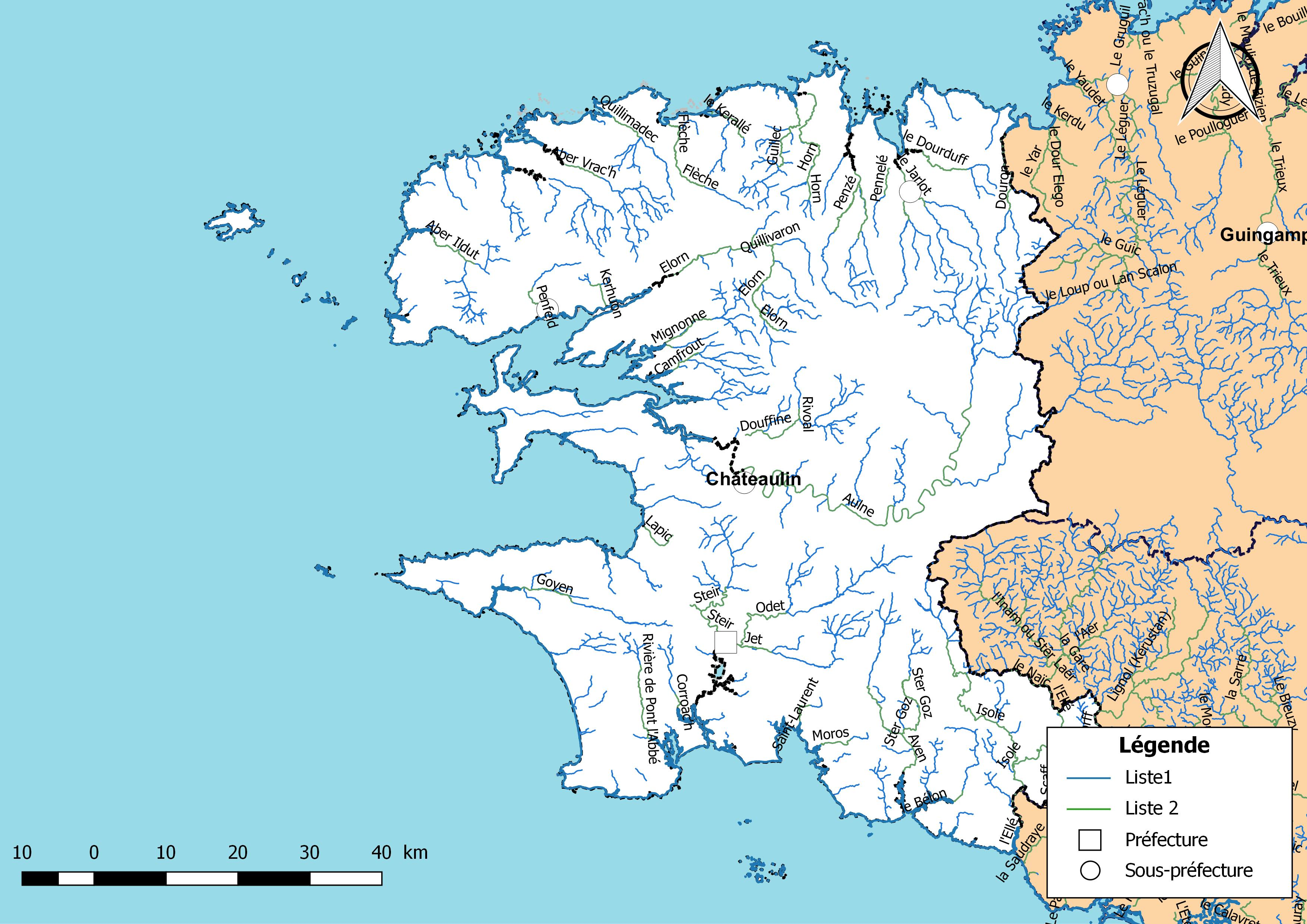 Classement des cours d'eau du département du Finistère (France) au titre de la continuité écologique (article L214.17 I du Code de l'environnement).